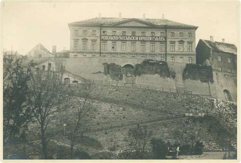 Холм Тоомпеа и здание суда в Ревеле (Таллине)